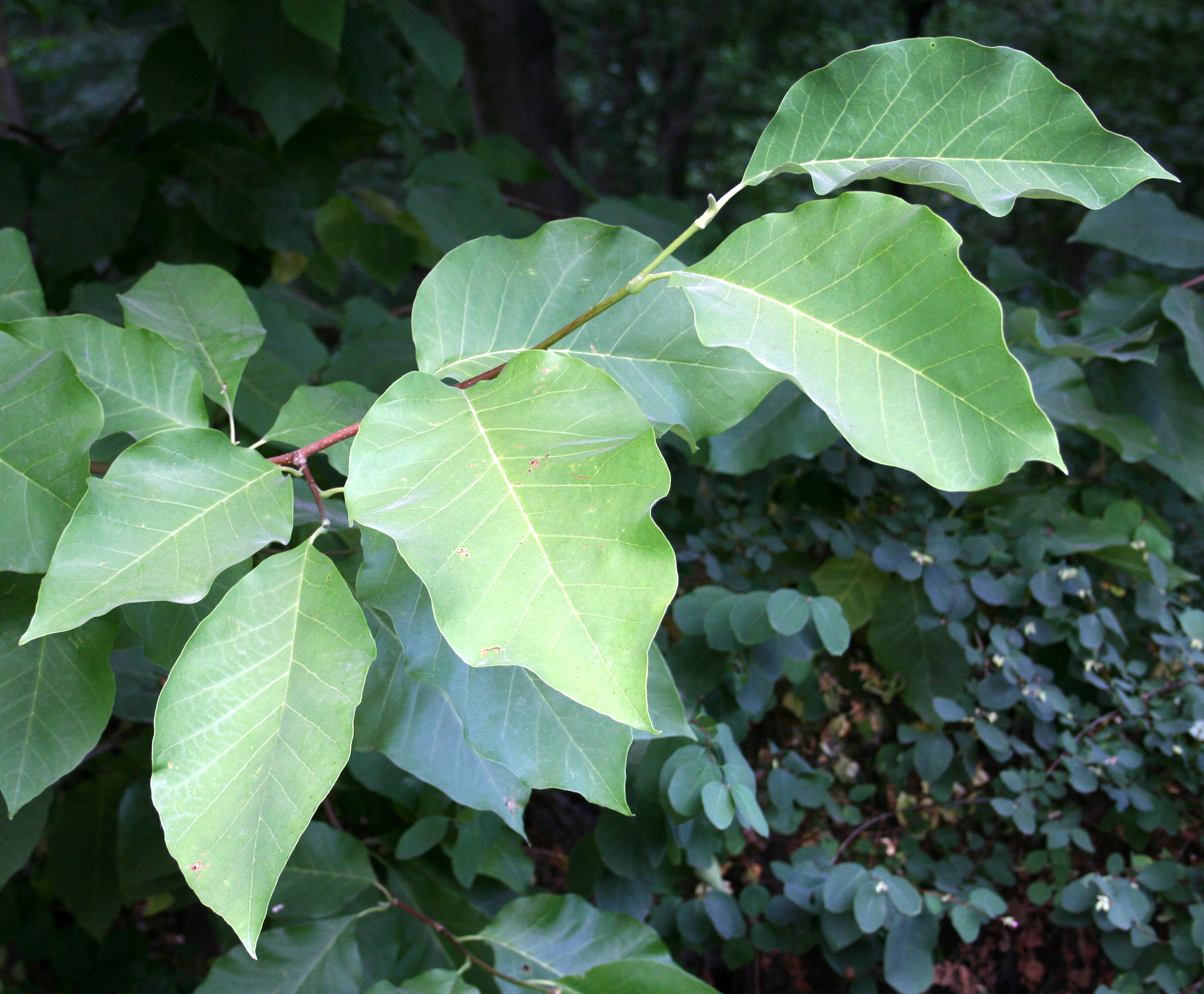 Liście_magnolii_drzewiastej